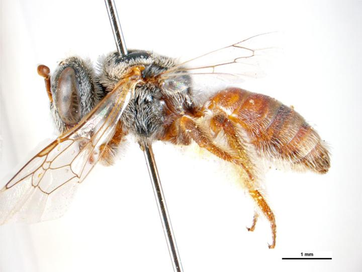 Leioproctus finkei female